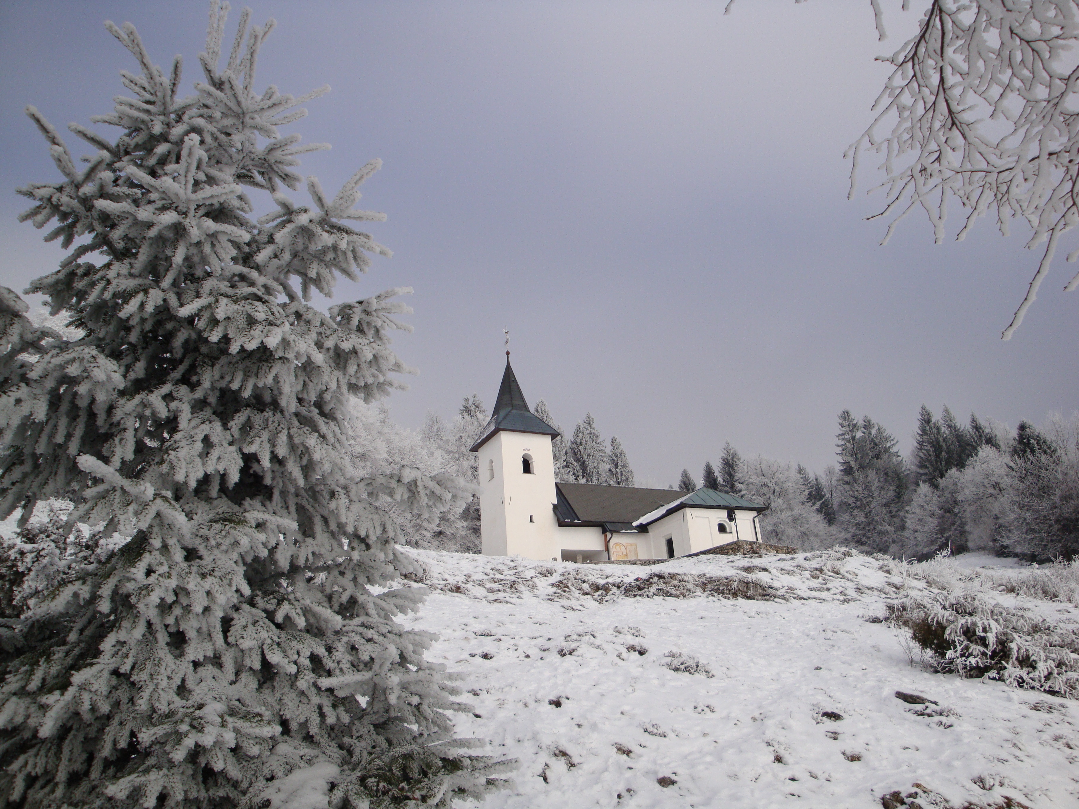 Cerkev svetega Lovrenca, Bašelj